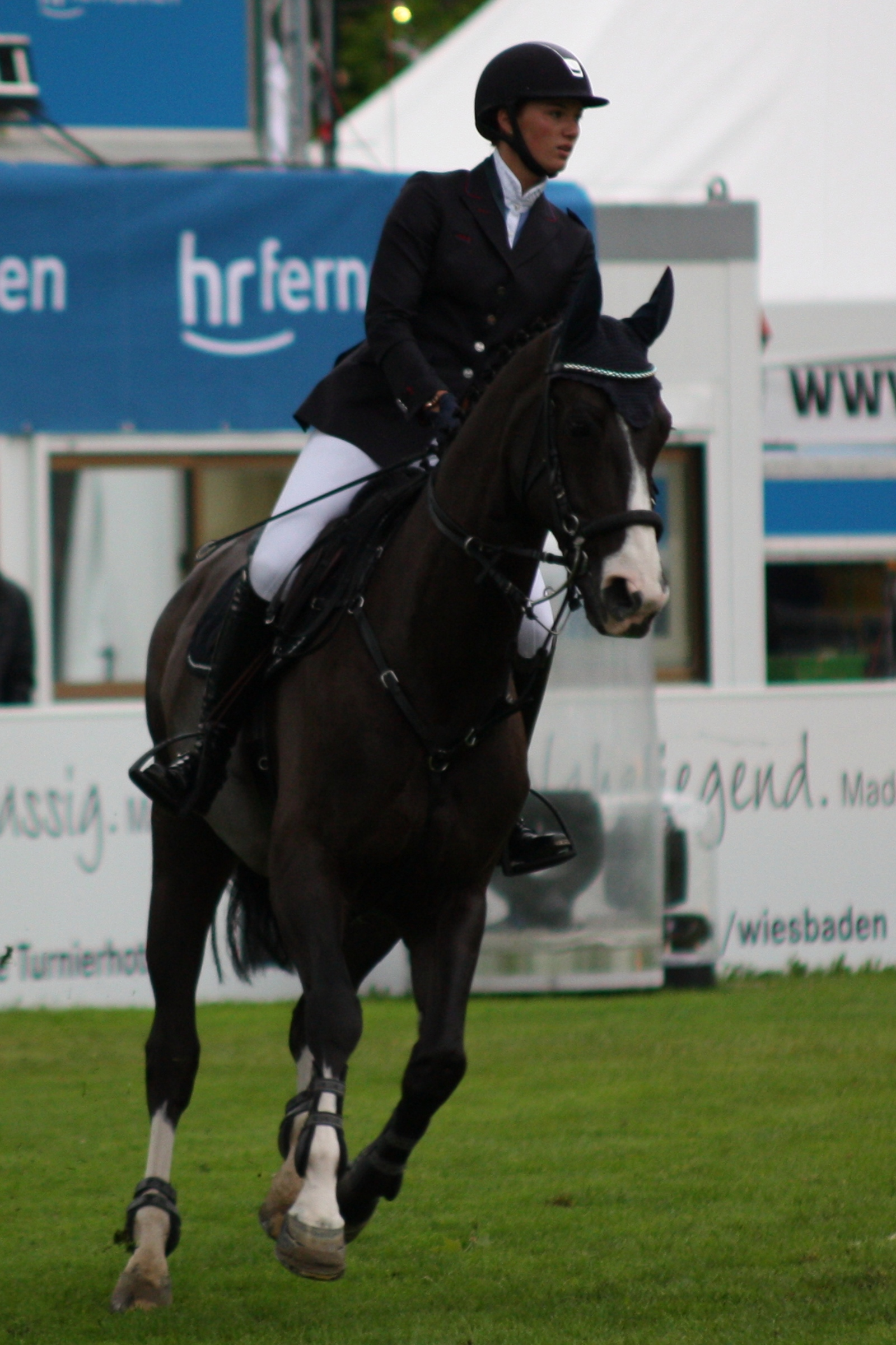 77. Internationanles Wiesbadener Pfingstunier 2013, CSI***** Eröffnungsspringen, Angelina Herröder auf Picos Boy Personality rights warning Although this work is freely licensed or in the public domain, the person(s) shown may have rights that legally restrict certain re-uses unless those depicted consent to such uses. In these cases, a model release or other evidence of consent could protect you from infringement claims.